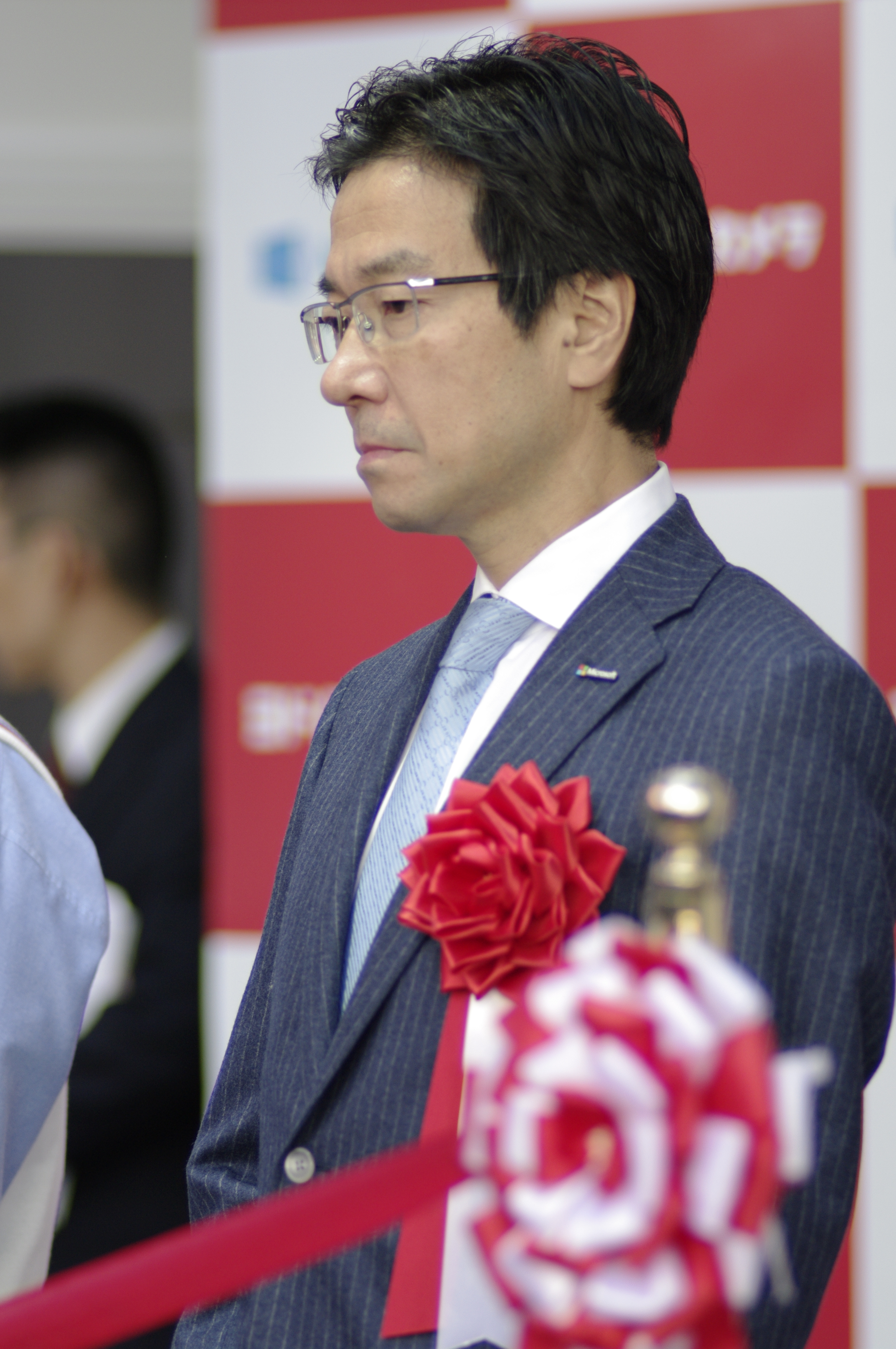 これまた渋い顔だなぁ